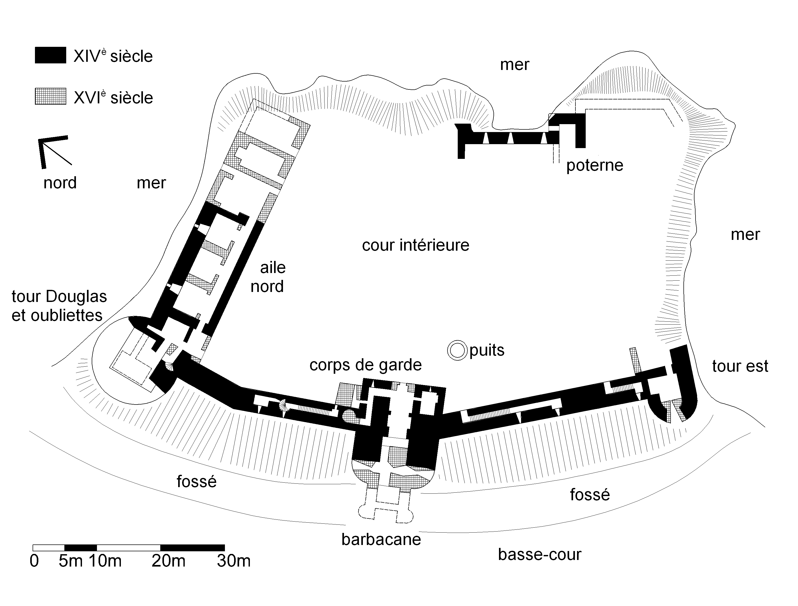 Plan du Château de Tantallon, dessiné à partir de plans publiés par la Royal Commission on Ancient and Historic Monuments Scotland et dans Castles of Lothian and Borders de Mike Salter (Folly, 1994, p.86).